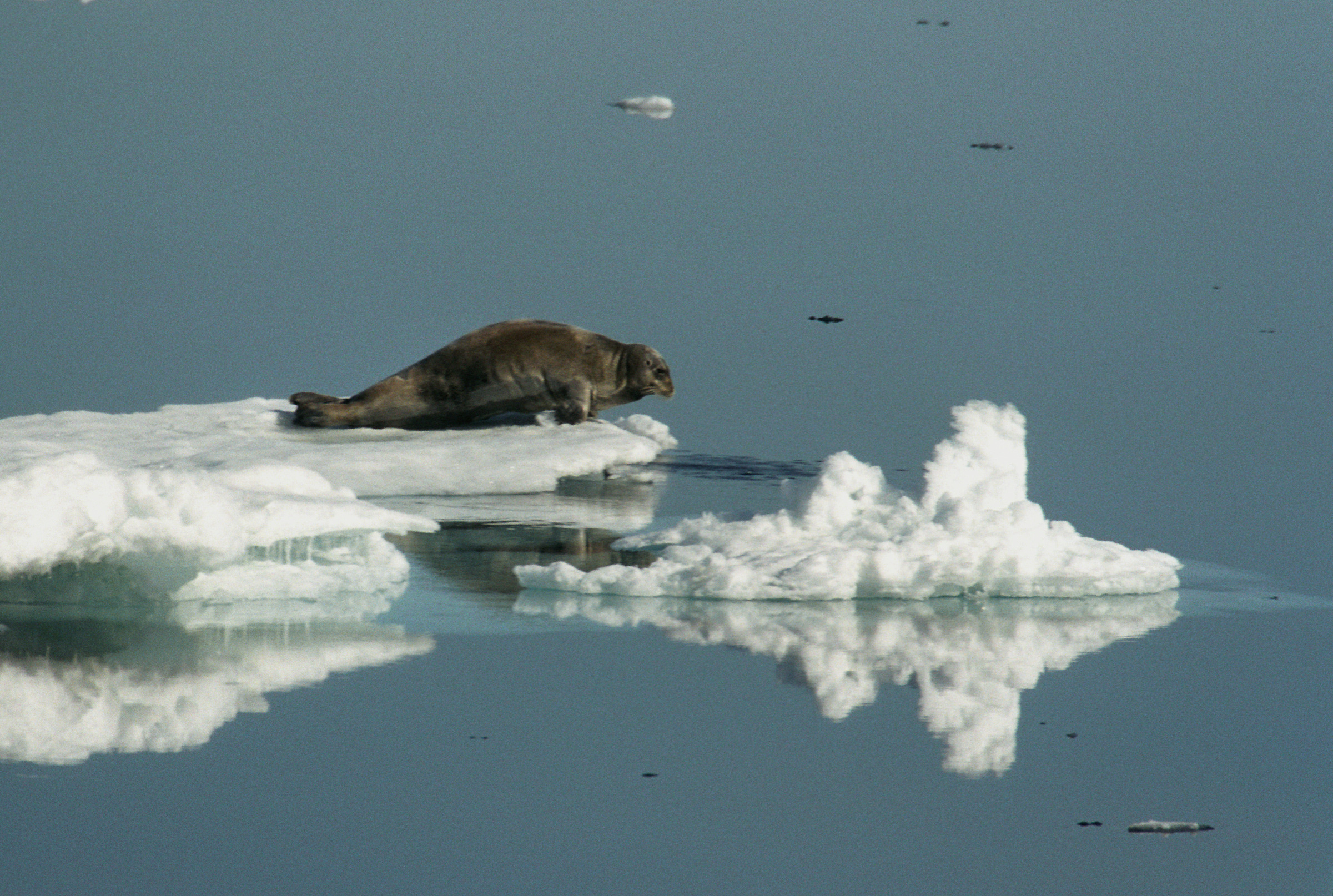 spitsbergen, Bearded Seal